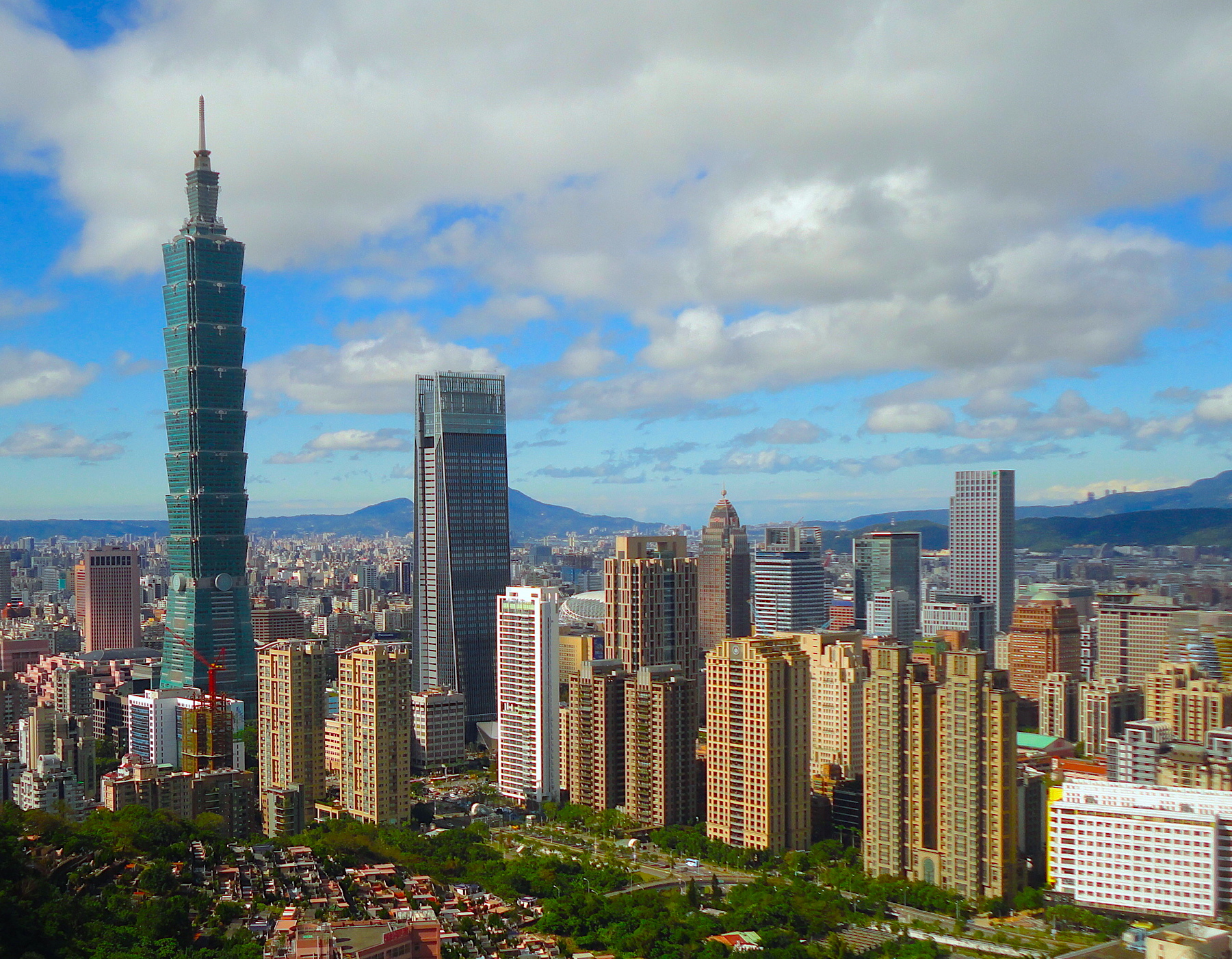 台灣 台北市 信義區 市中心 天際線 高樓大廈 摩天大樓